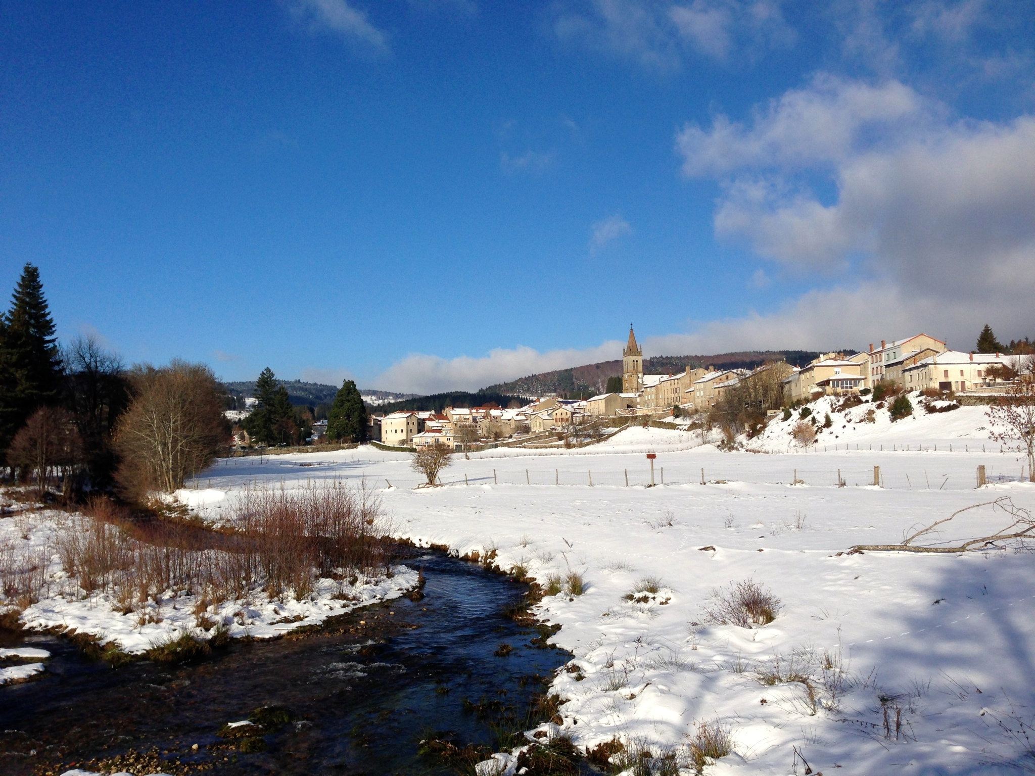 Saint-Anthème en hiver